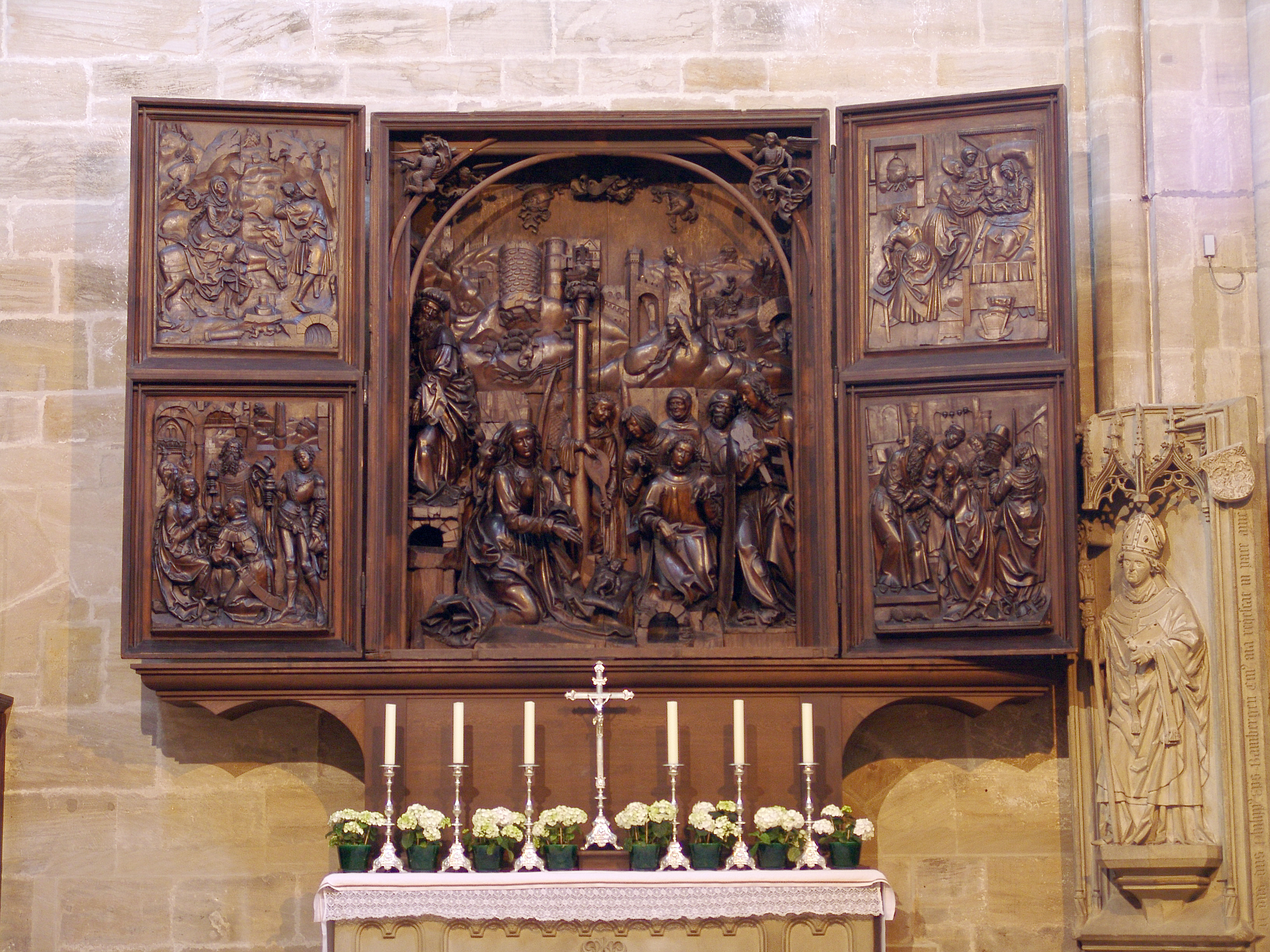 Veit Stoss Altar